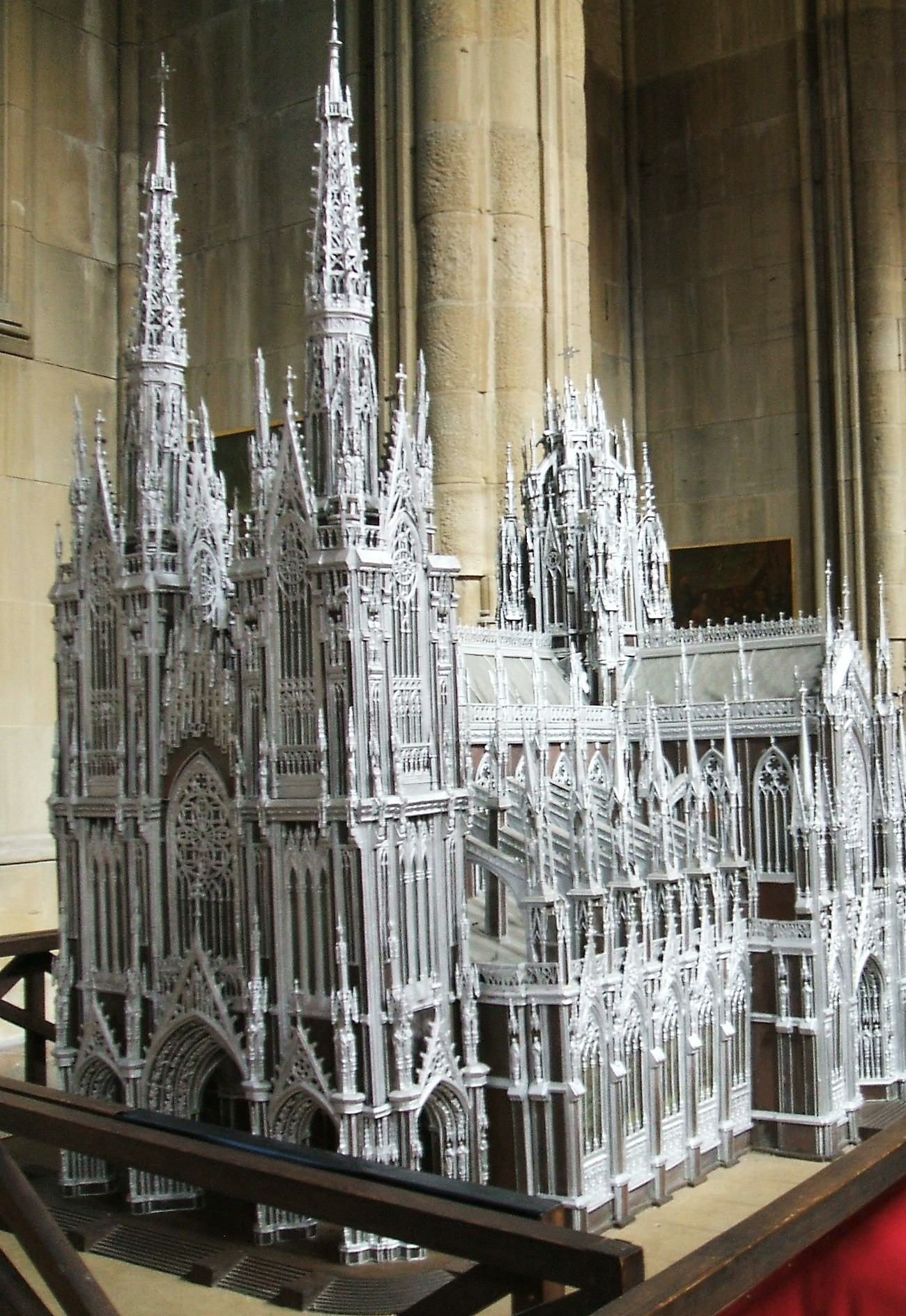 Maqueta del proyecto original de la Catedral Nueva de Vitoria, en el interior de la Catedral